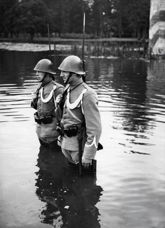 Nationaal Archief / Spaarnestad Photo, SFA002007151 Soldaten in lieslaarzen staan op wacht in het inundatiegebied van de Hollandse Waterlinie tijdens de mobilisatie voor de Tweede Wereldoorlog, Nederland, november 1939. Mobilization in the Netherlands (Second World War). Dutch soldiers standing on guard. The Netherlands, location unknown, November 1939. Collectie Spaarnestad Voor meer informatie en voor meer foto’s uit de collectie van Spaarnestad Photo, bezoek onze Beeldbank: U kunt ons helpen onze kennis van de fotocollecties te verrijken door tags en commentaren toe te voegen. Herkent u mensen of locaties of heeft u een bijzonder verhaal te vertellen bij één van de foto’s, laat dan een reactie achter (als u ingelogd bent bij Flickr) of stuur een mailtje naar: You can help us gain more knowledge on the content of our collection by simply adding a comment with information. If you do not wish to log in, you can write an e-mail to